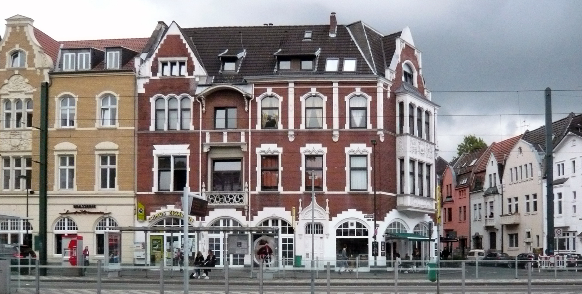 Häuser Belsenplatz Nr. 1 und Nr. 3 Ecke Sonderburgstraße, Düsseldorf-Oberkassel